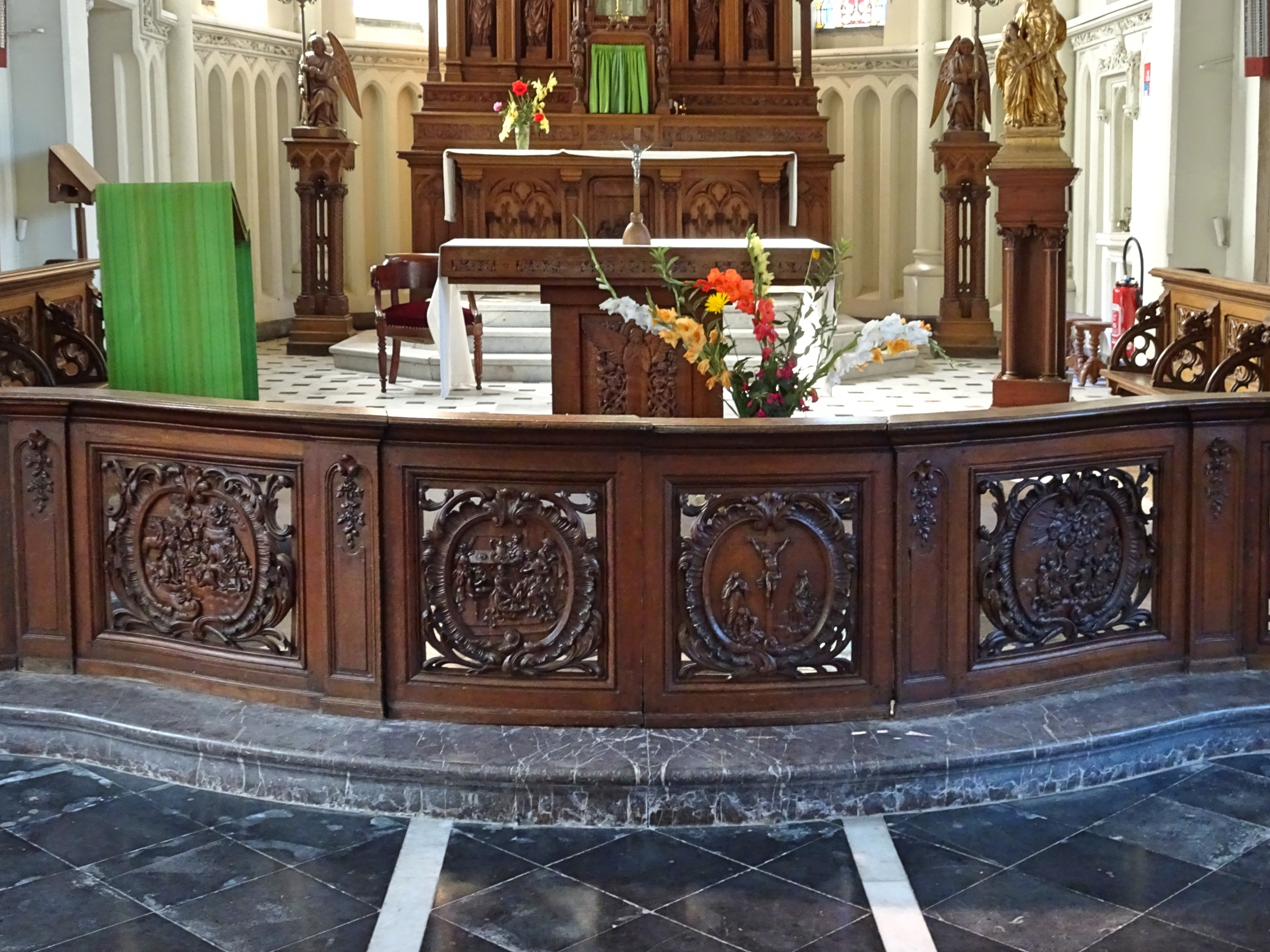 clôture de chœur (table de communion) : la Nativité, le Lavement des pieds, la Crucifixion, l'Ascension dans l'église Saint-Martin Terdeghem , Nord, France